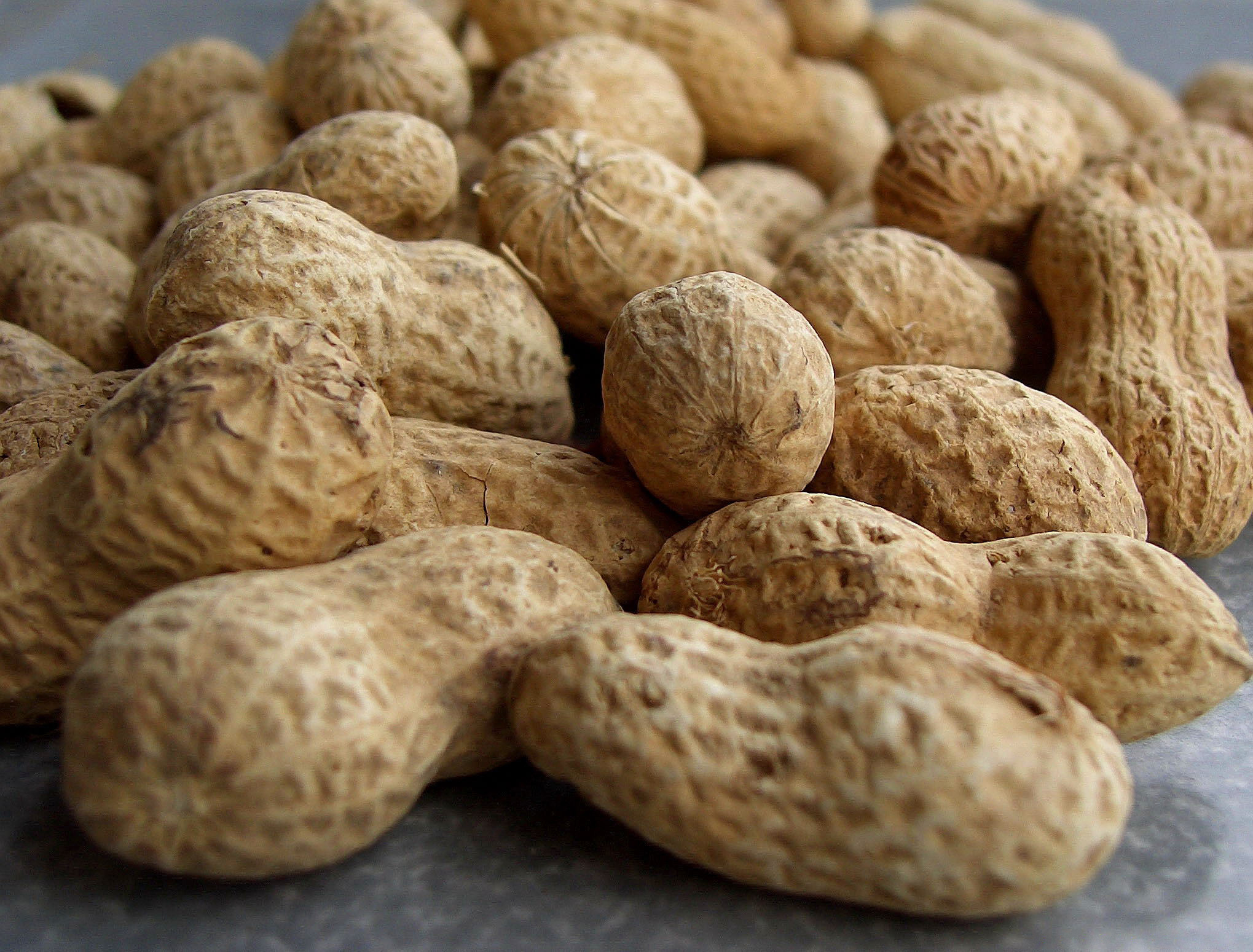 cacahuete, maní, peanut, arachide, Erdnuß, cacaouette, pero en todas ellas su nombre es... díganlo ahí